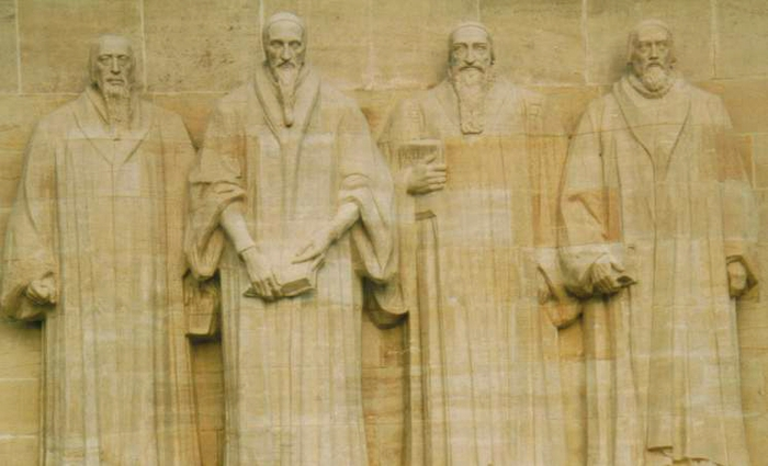 Le mur des confédérés à Genève